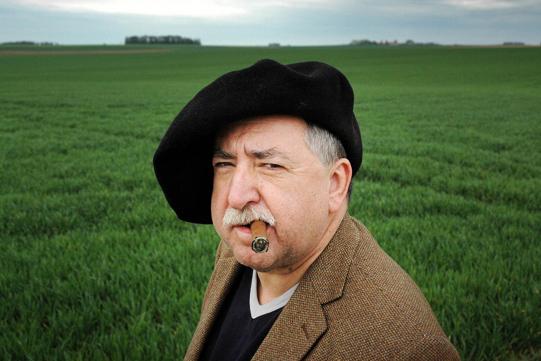 Paul Van Nevel, Vlaams dirigent en musicoloog.